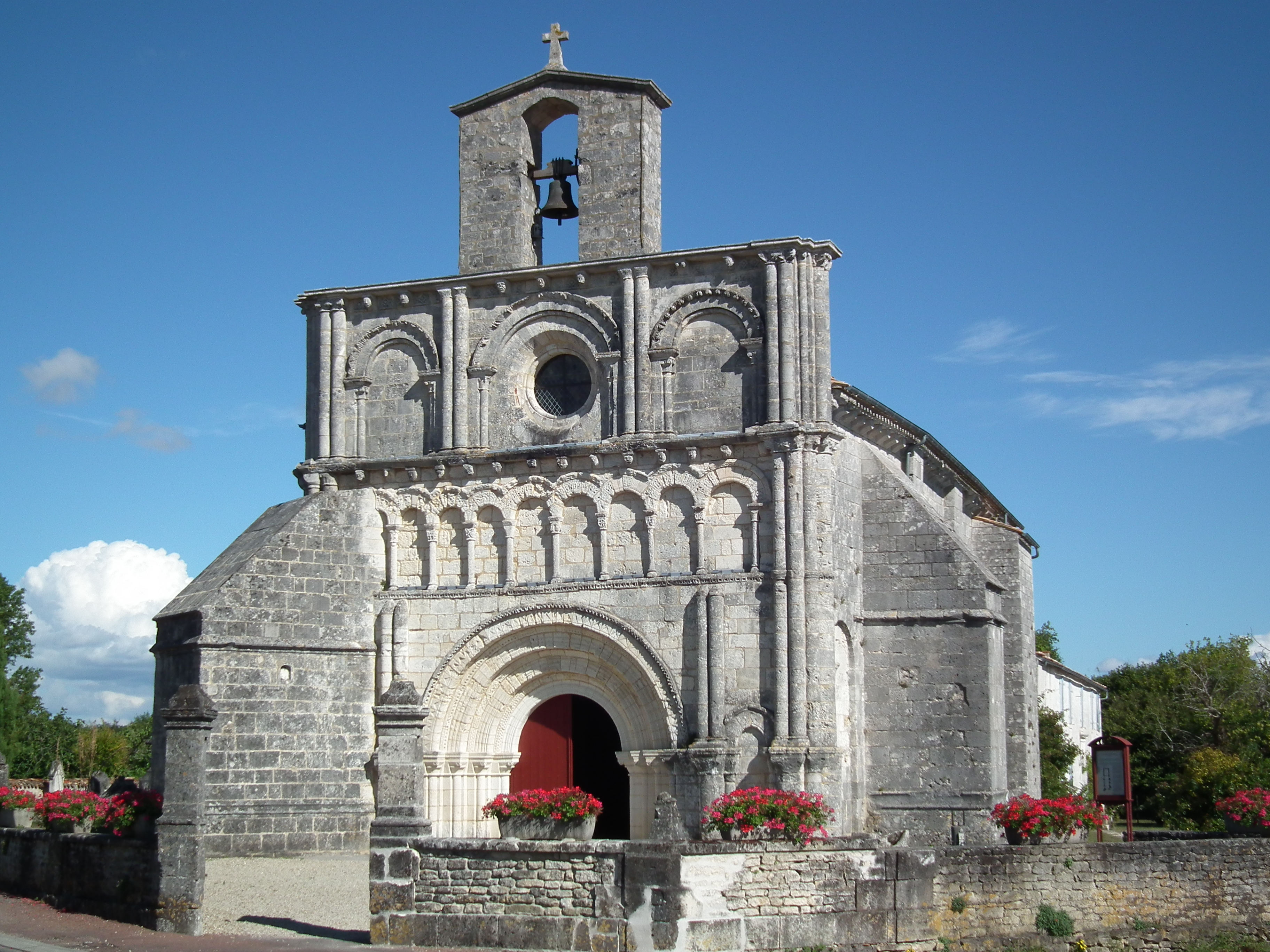 L'église Saint-Vivien de Breuillet, en Charente-Maritime